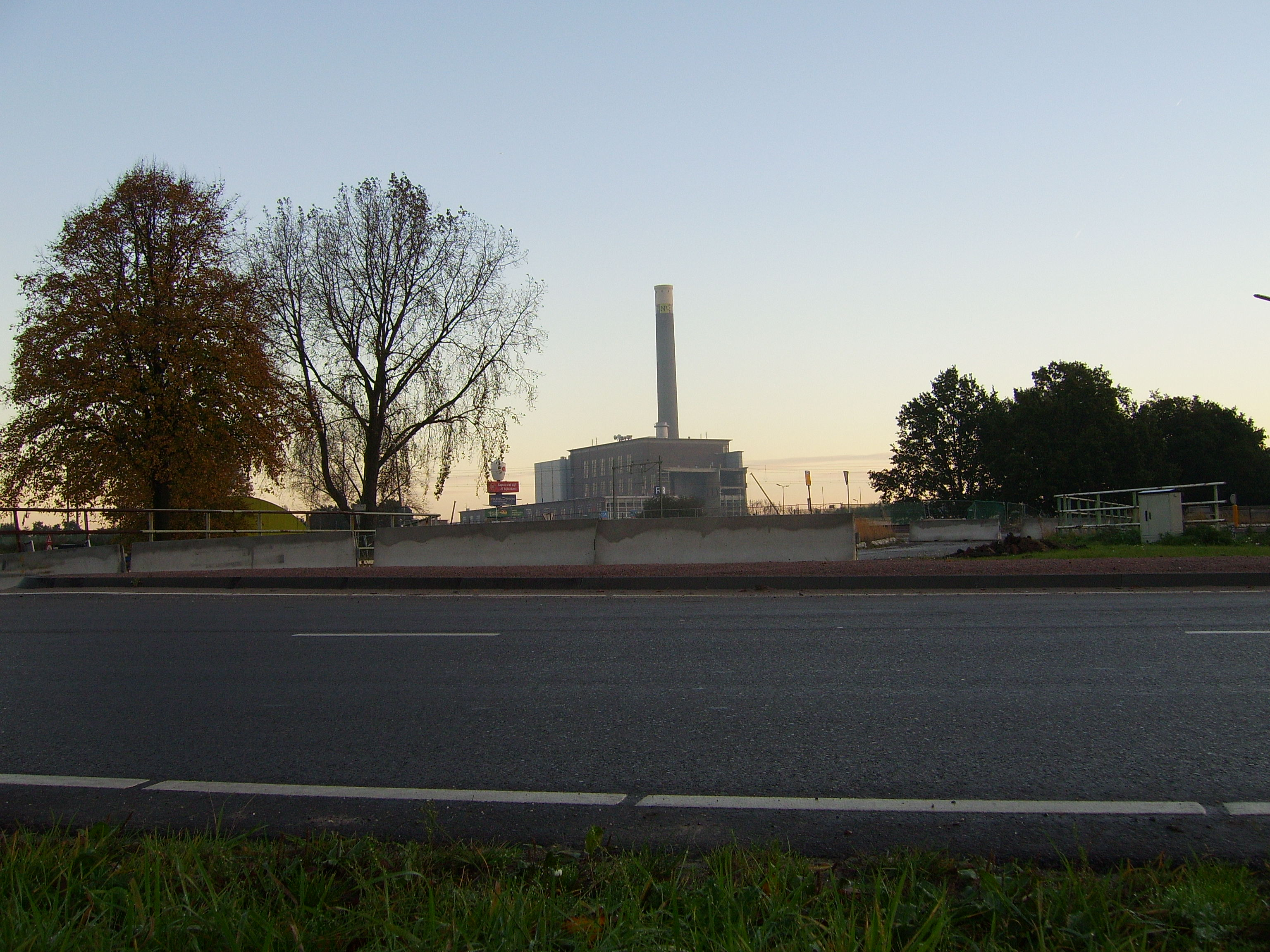 eigen werk Ruben Alexander